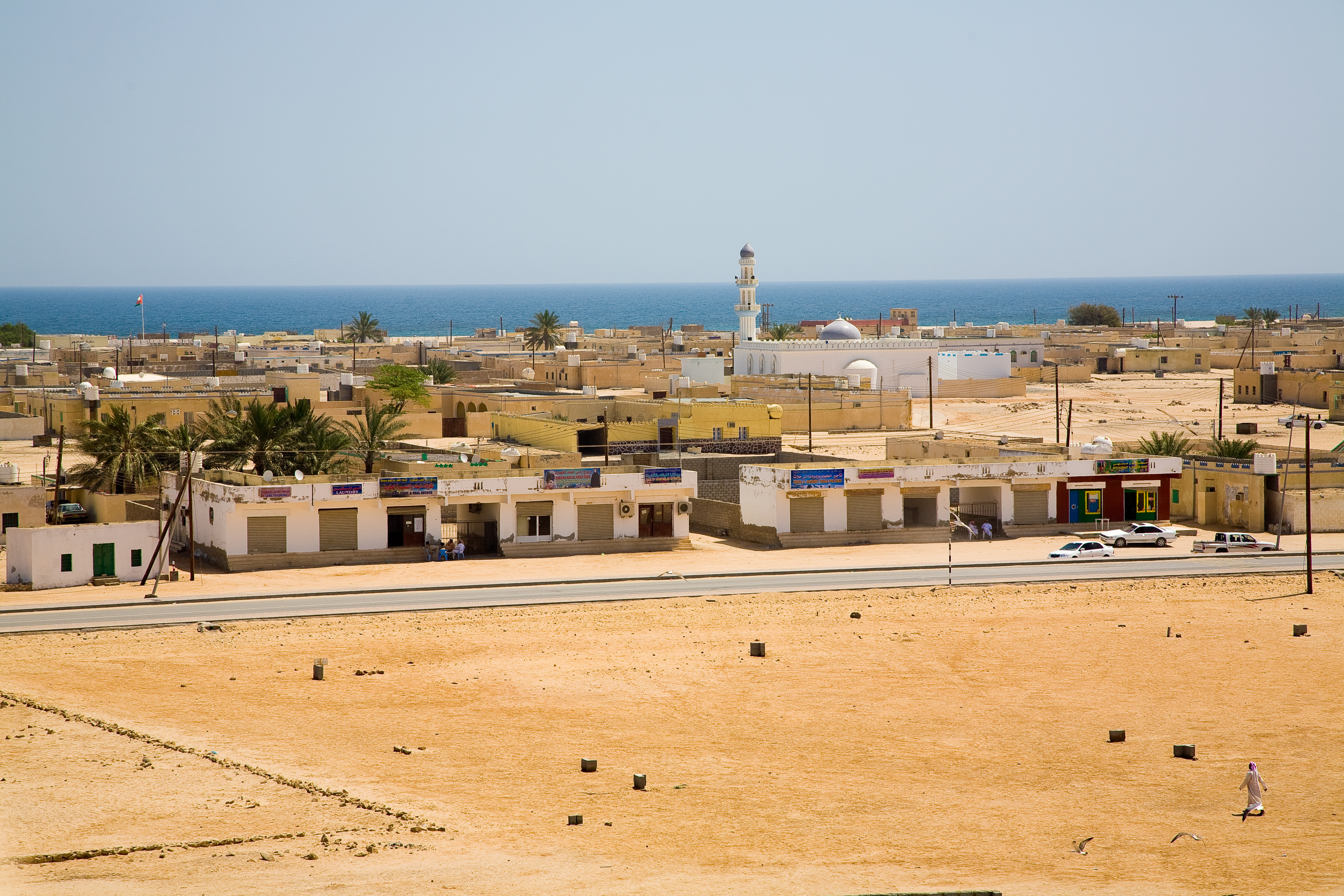 Sur, Oman